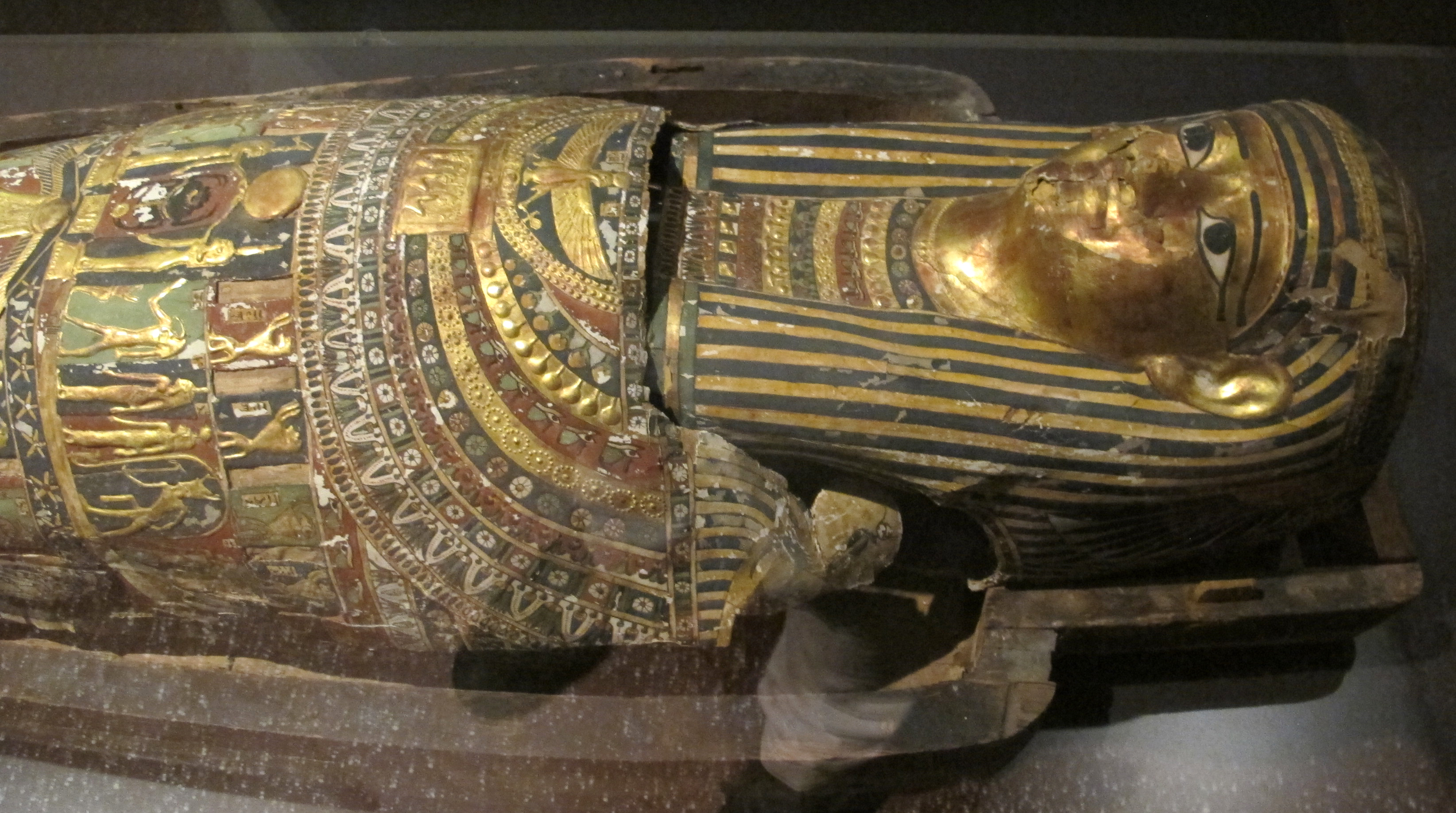 Ancient Egyptian art in the Museo archeologico nazionale (Florence)